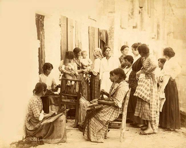 Venezia. Giudecca. Lavoratrici di corda